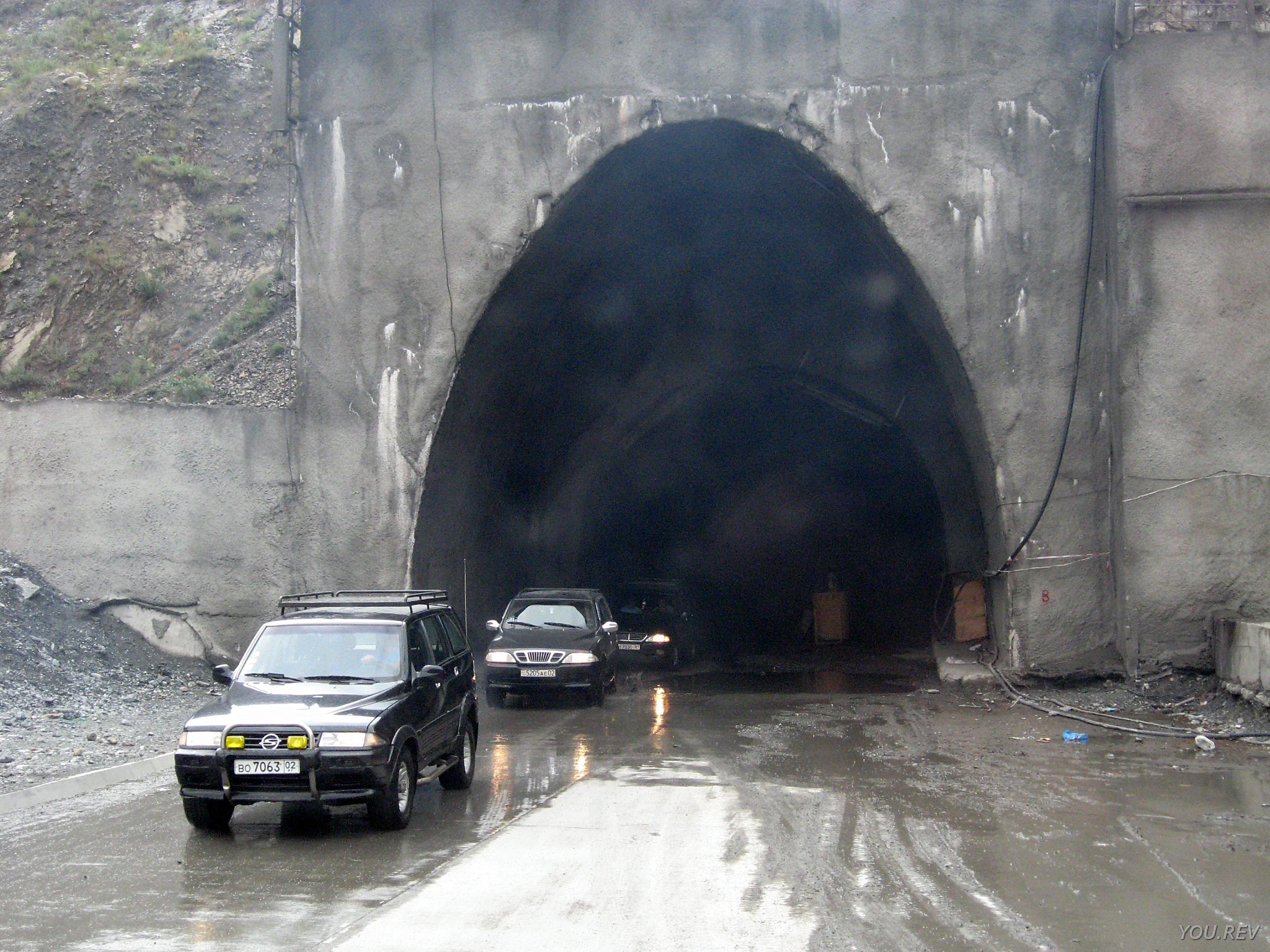 Въезд в тоннель со стороны Худжанда